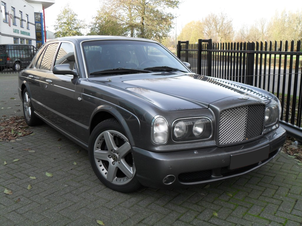 Foto Bentley Arnage T